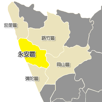 永安區相對位置